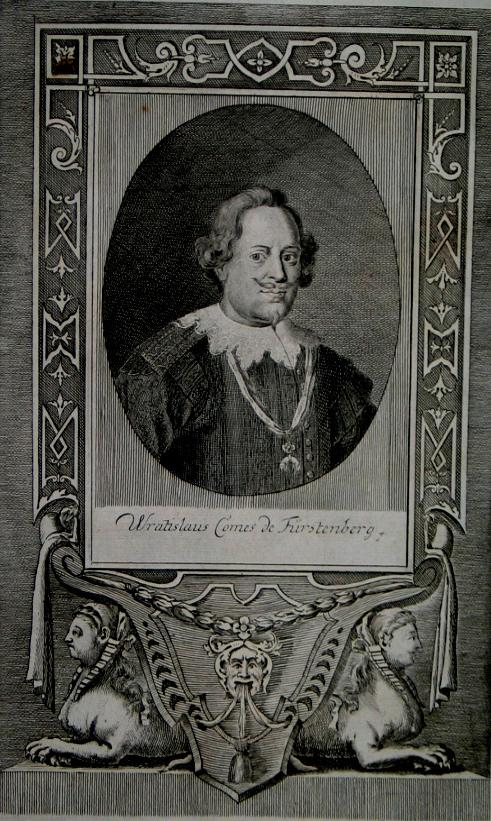 Wratislav Graf von Fürstenberg (1584 bis 1631) : Reichshofratspräsident. / Leicht gebräunt und fleckig, winziges Wurmloch im weissen Rand.